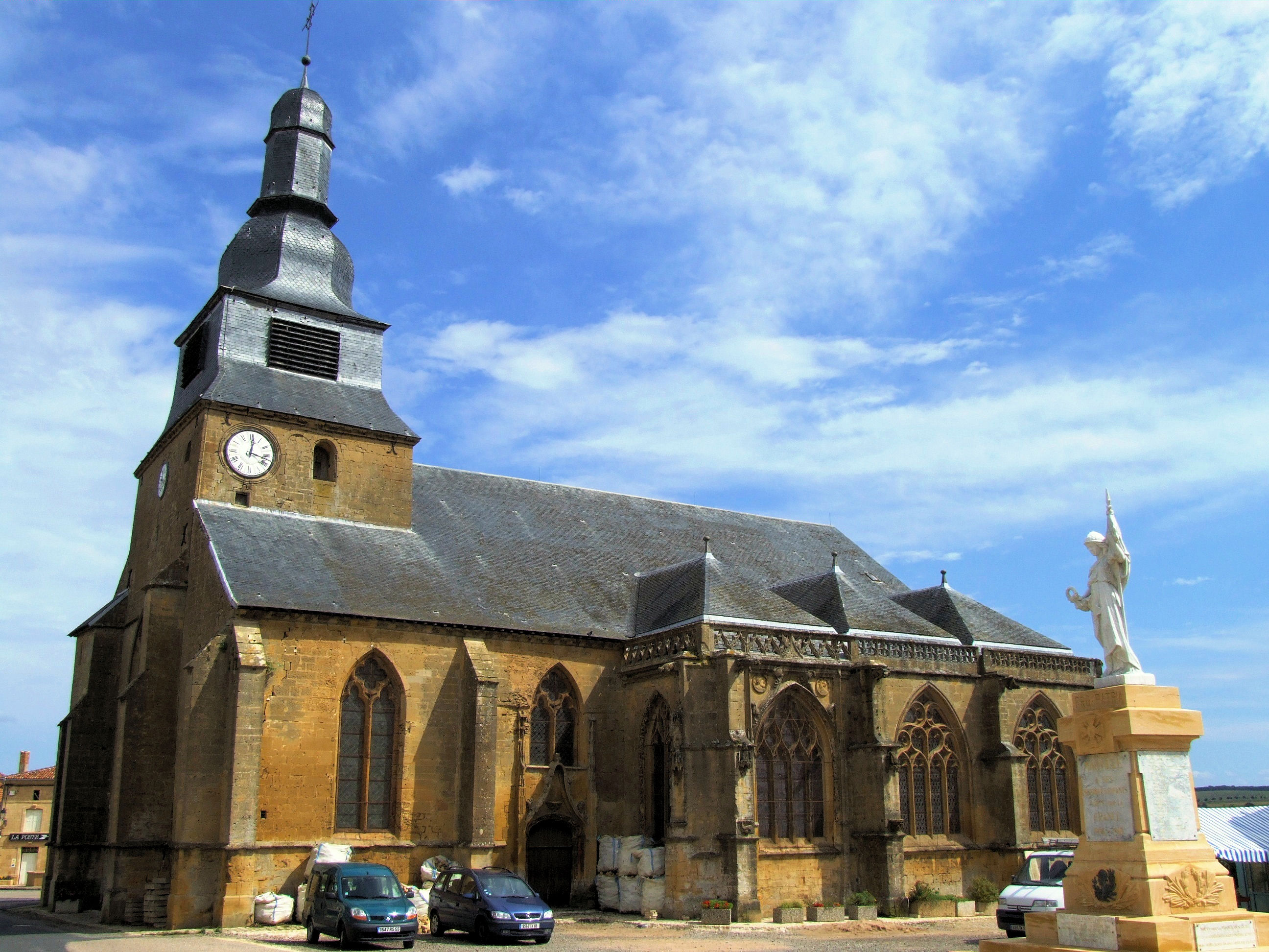 Marville - Eglise Saint-Nicolas